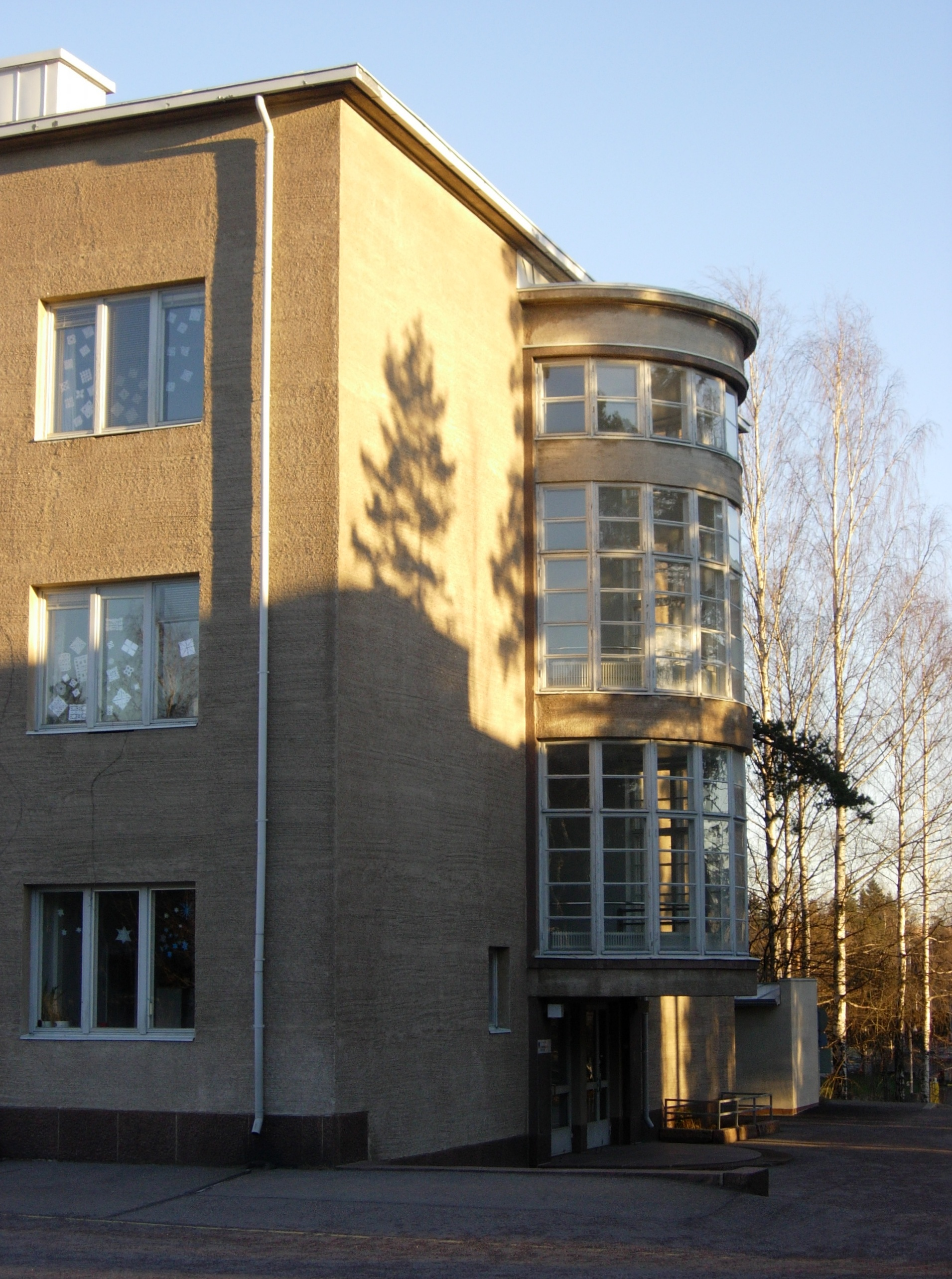 Munkkiniemen ala-aste.